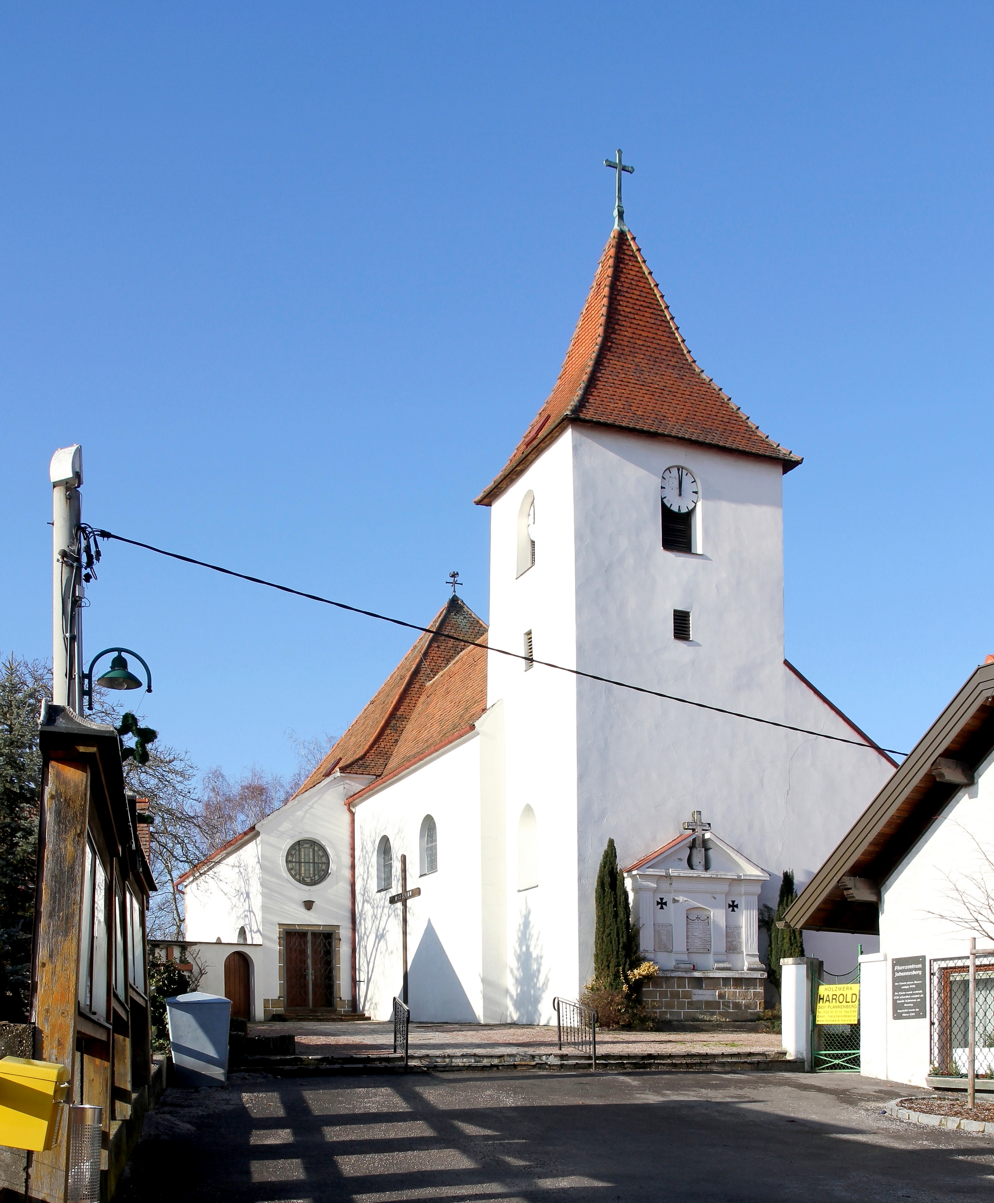 Kath. Pfarrkirche hl. Johannes der Täufer in Johannesberg, ein Ortsteil der niederösterreichischen Marktgemeinde Asperhofen. Ein im Kern romanische Chorturmkirche aus dem 12. Jahrhundert in erhöhter Lage. Vermutlich nach der Zerstörung durch die Türken Ende des 17. Jahrhunderst verändert. 1947/51 erfolgte eine großräumige Erweiterung Richtung Westen.